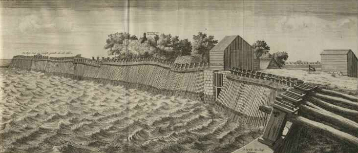 Prent van een palendijk langs de voormalige Zuiderzee bij de Ipenslotersluis tussen Amsterdam en Muiden